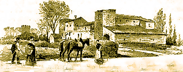 Tours médiévales dominant le mas d'Albaron en Petite Camargue